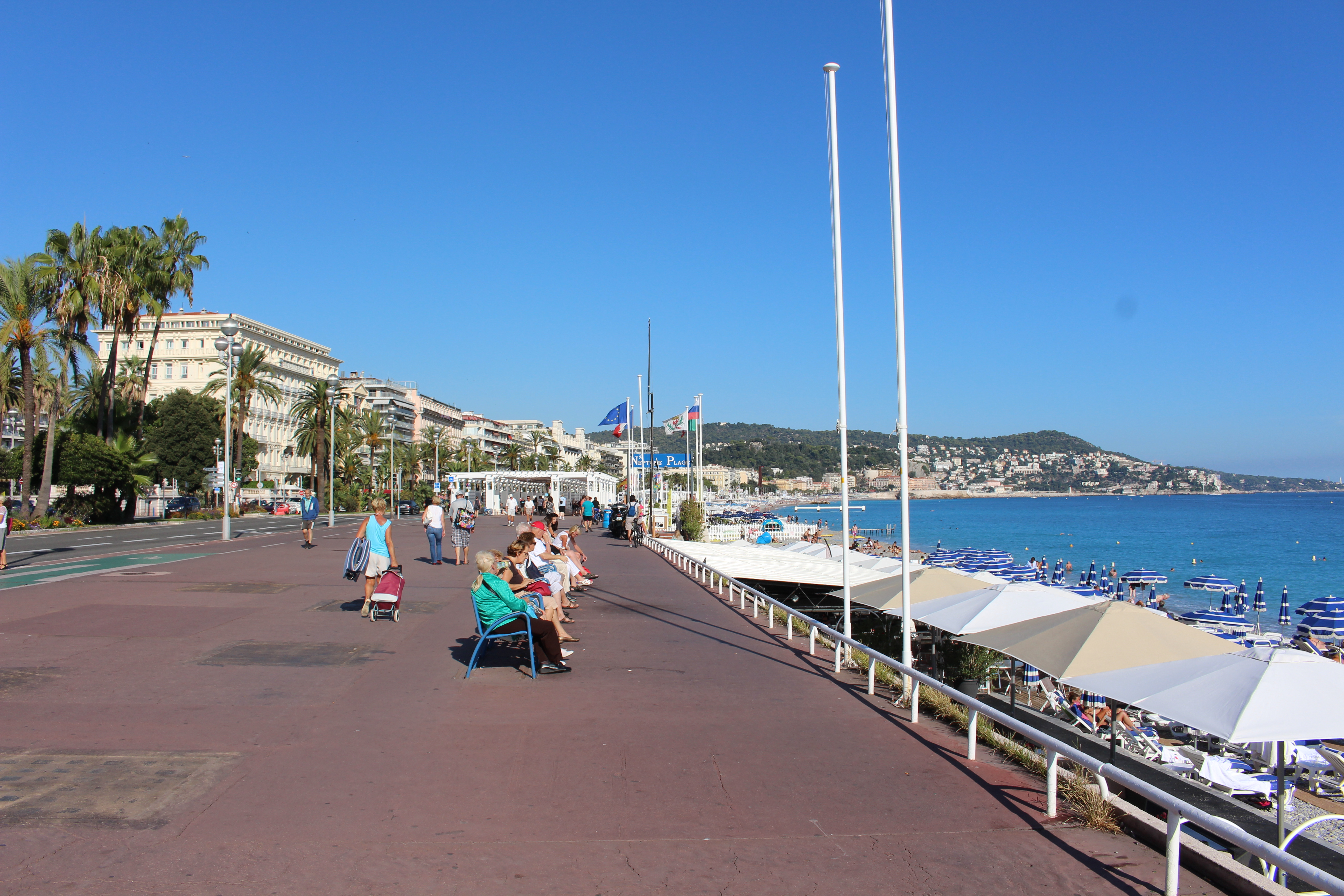 Английская набережная (Promenade des Anglais)